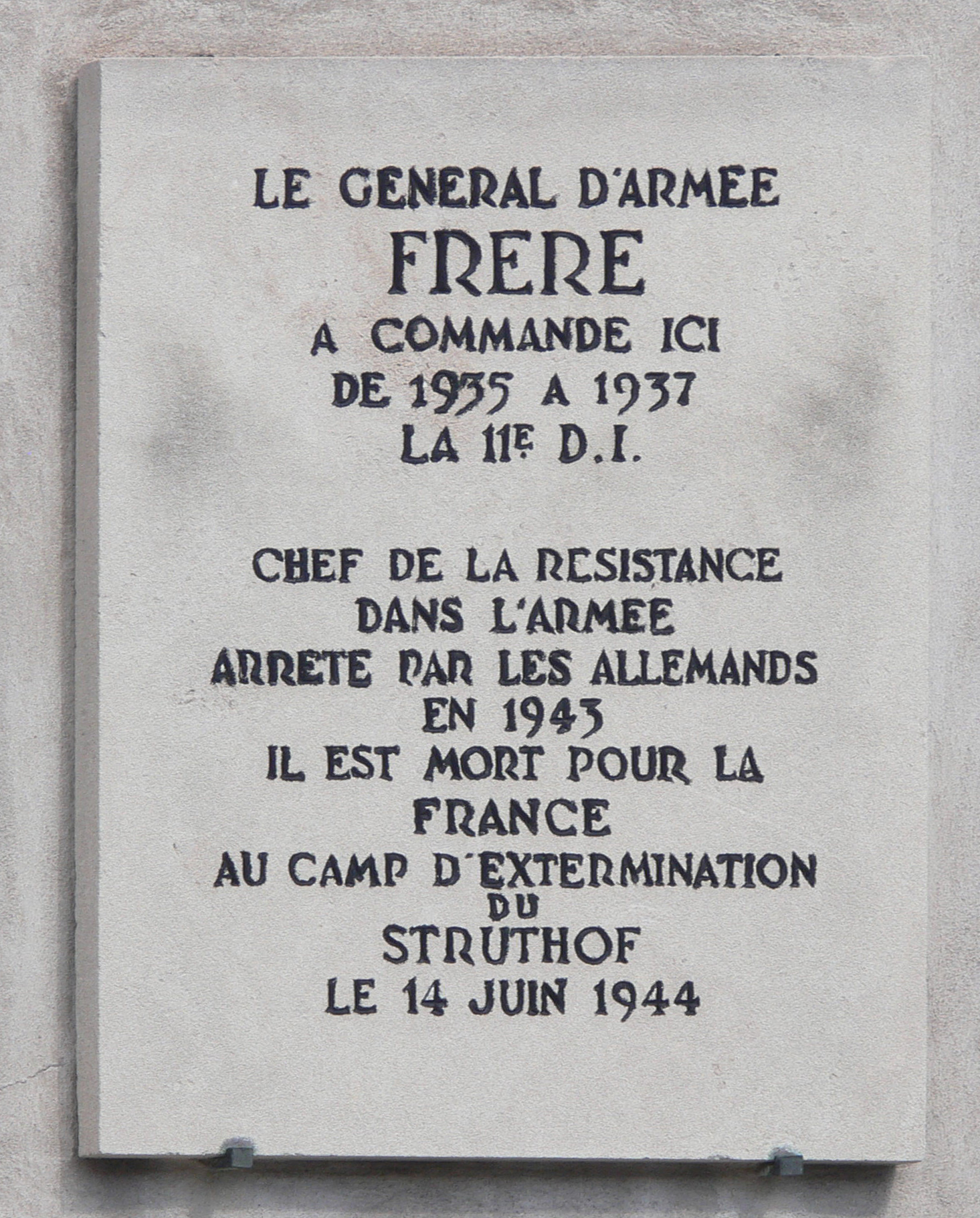 Nancy. Immeuble, 8 place de la Carrière (Inscrit, 1925) .